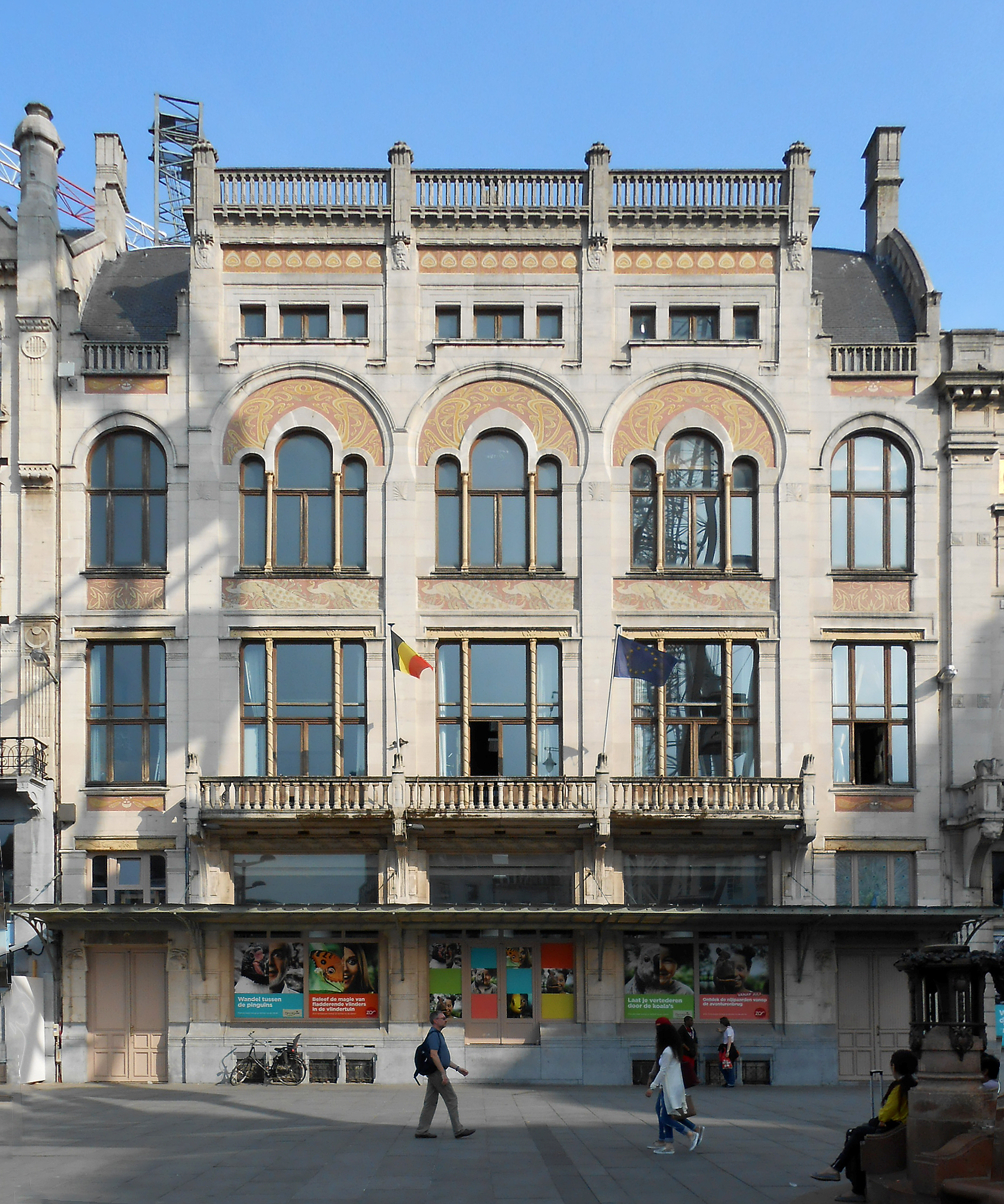 Koningin Astridplein 25 Brasserie Paon Royal (thans in verbouwing)